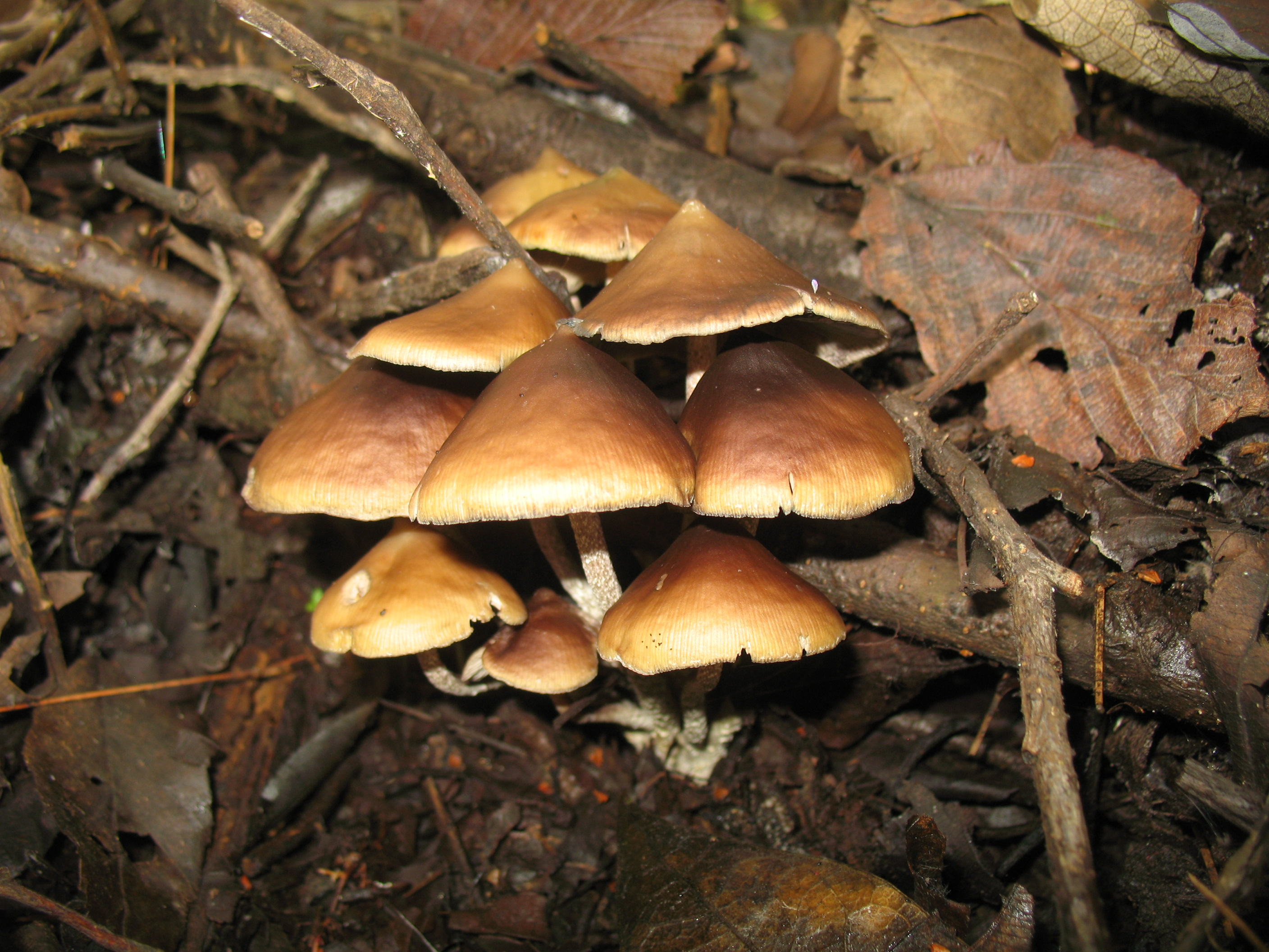 Psilocybe zapotecorum. Jalisco, Mexico.